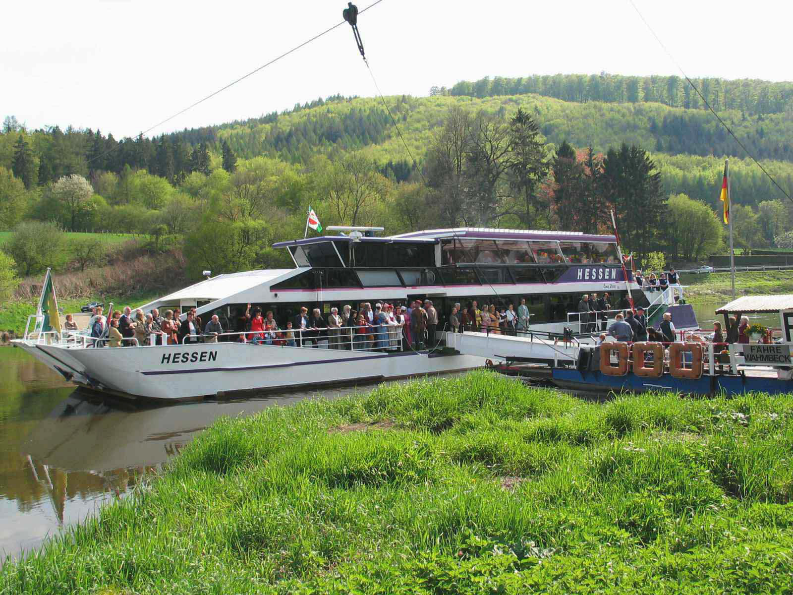 Fahrgastschiff "Hessen" in Wahmbeck (Oberweser) 2004 - Fotograf: Linie 2000 - GNU-FDL Erklärung des Rechteinhabers: Sehr geehrte Damen und Herren, als Mitarbeiter an der freien Enzyklopädie Wikipedia im Internet ( ist mir aufgefallen, dass zwar in einigen Artikeln, z. B. „Weser“, „Hann. Münden“ und „Reinhardshagen“, die Linie2000 und das Fahrgastschiff Hessen erwähnt sind, jedoch kein anschauliches Bild vorhanden ist. Nun meine Bitte: Könnte ich von Ihnen ein oder zwei Fotos erhalten, die die "Hessen" in Funktion zeigen, möglichst beim „Anlegen“ mit ausgeschwenkter Gangway? Die Fotos sollten hoch aufgelöst sein (mindestens 300px) und müssten von Ihnen ausdrücklich als gemeinfrei deklariert sein, d. h. es darf kein Urheberschutz bestehen. Die bei Wikipedia verwendete Lizenz ist GNU-FDL. Dies gilt für alle 80.000 bisher in Wikipedia eingestellten Bilder und ermöglicht die freie Kopierbarkeit und Weiterverwendung in anderen Projekten. Fotograf, Aufnahmeort und -datum werden bei der Veröffentlichung genannt, ebenso Ihre explizite Zustimmung. Mit freundlichen Grüßen presse03 Sehr geehrter Herr (presse03), in der Anlage senden wir Ihnen zwei Bilder unseres Fahrgastschiffes „Hessen“ zu Ihrer Verwendung. Mit freundlichen Grüßen Linie 2000 Bernd Schindewolf Hafenplatz 8 (Rathaus) 34385 Bad Karlshafen